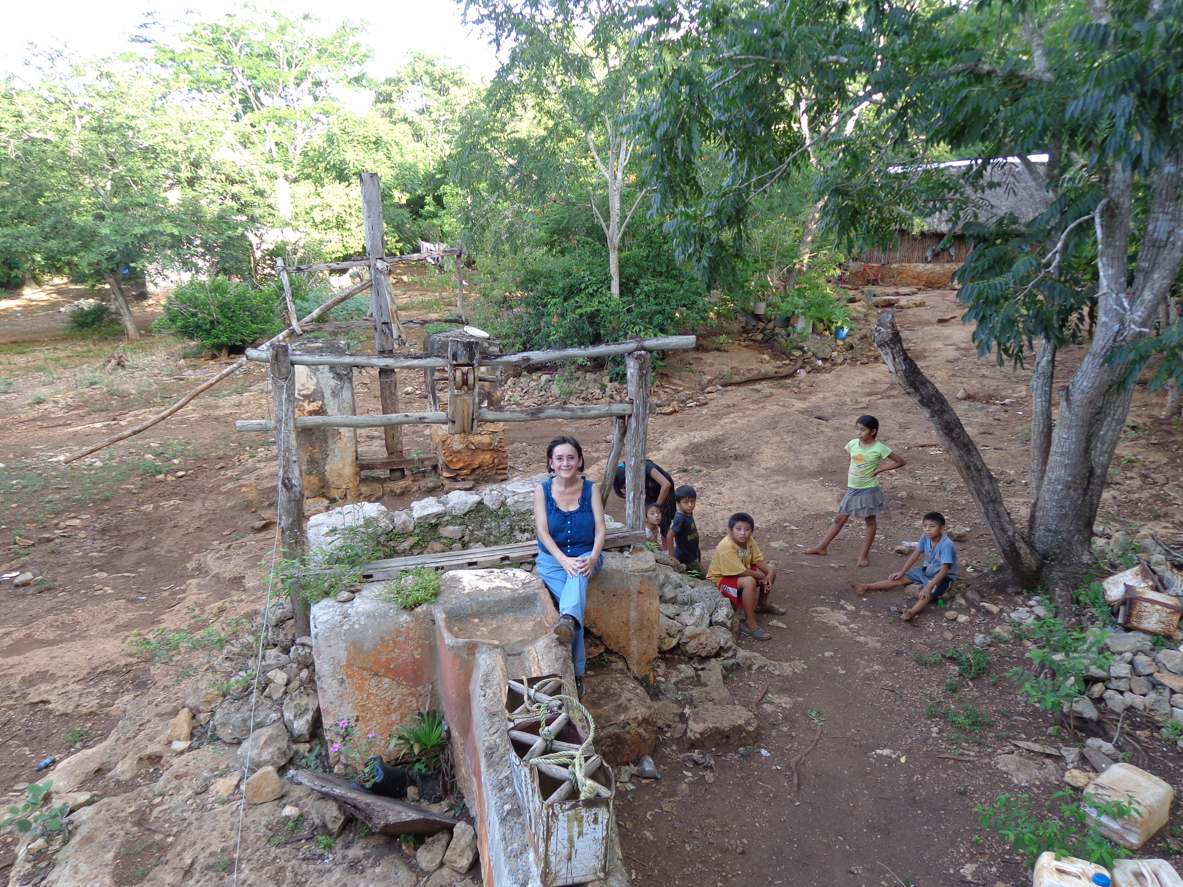 Doctora Teresa Rojas Rabiela junto visitando un pozo y una notira en San Marcelino, Yucatán, México